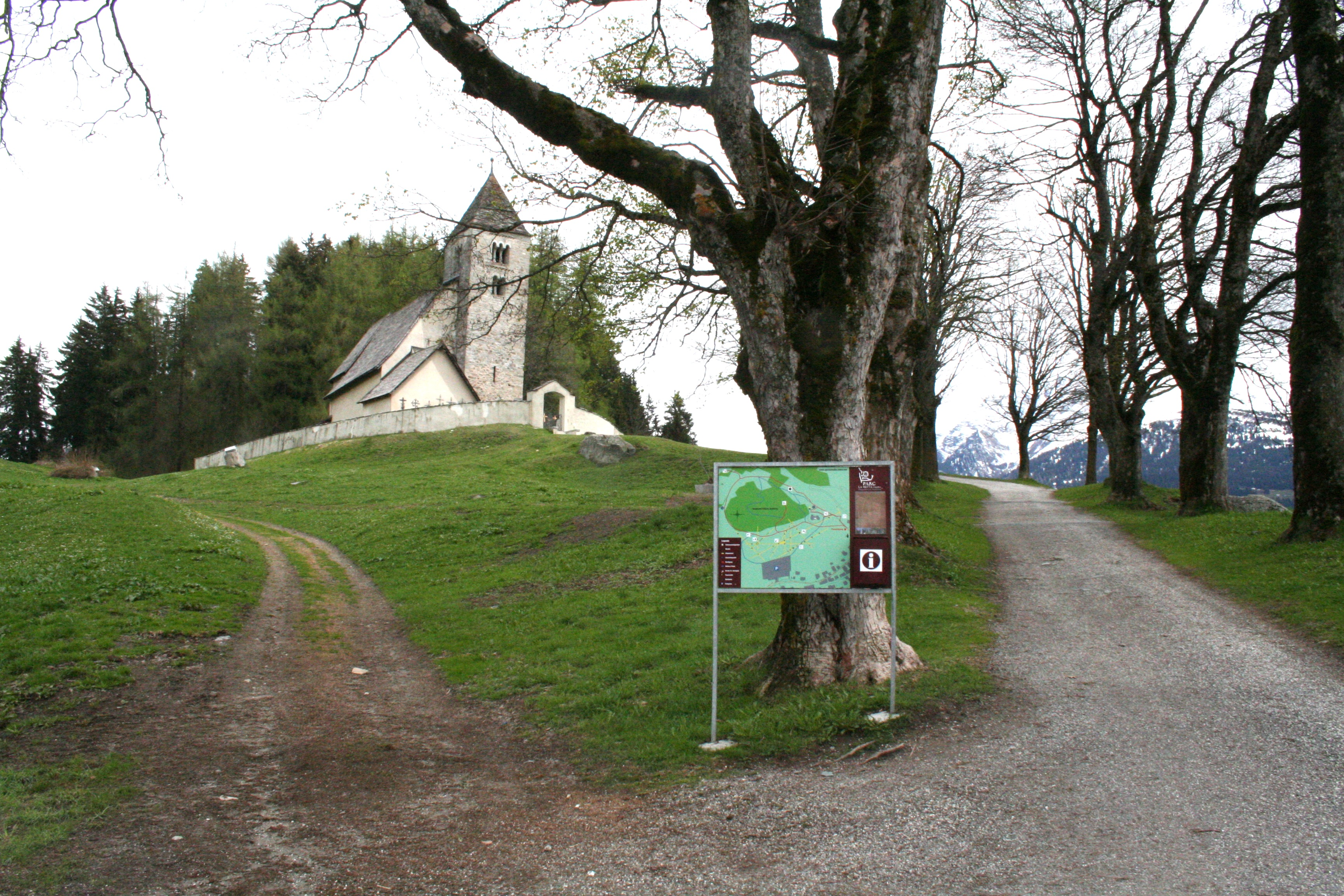 Parc la Mutta: Aufgang zum Park